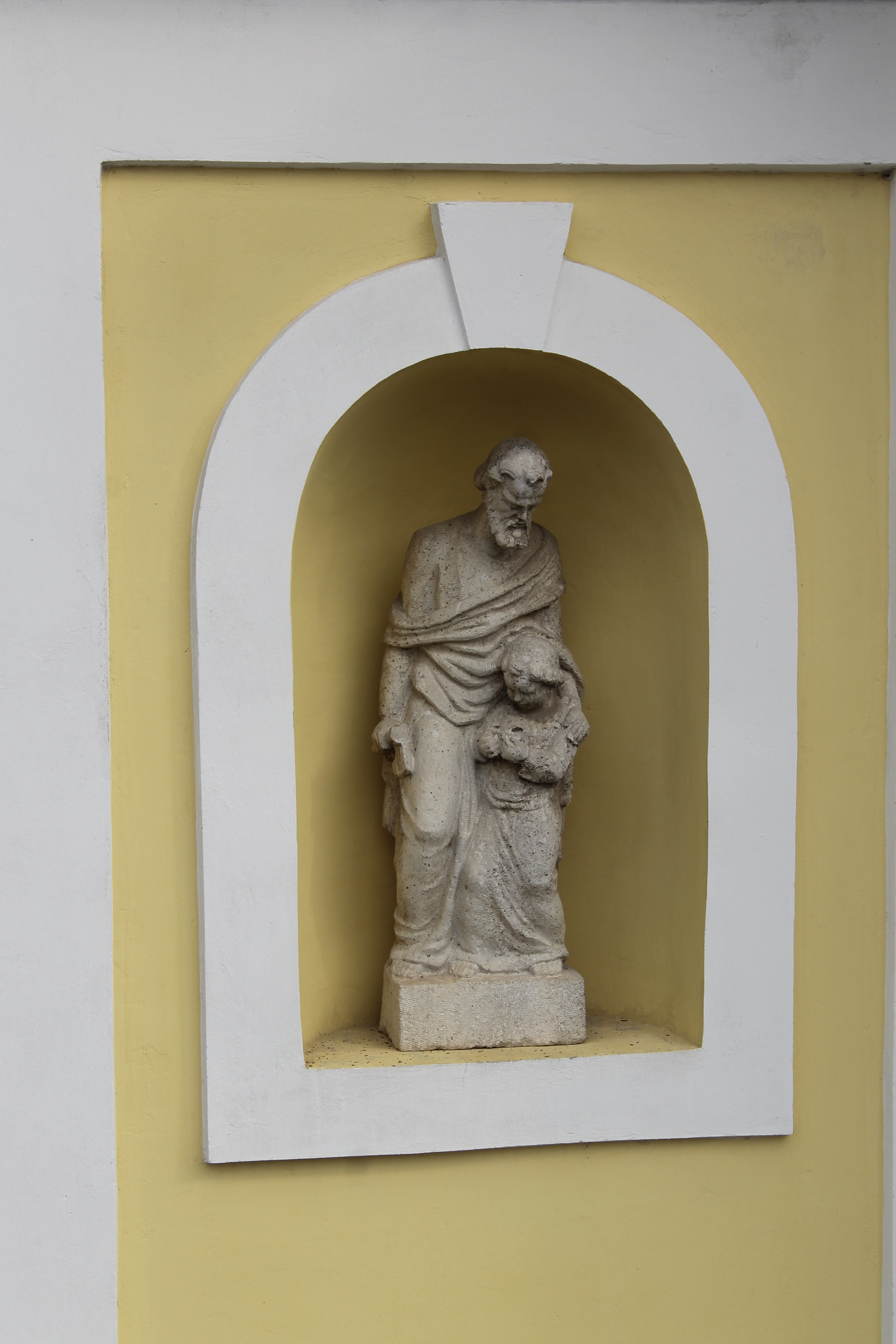 A pilisszentiváni templom Szent József-szobra